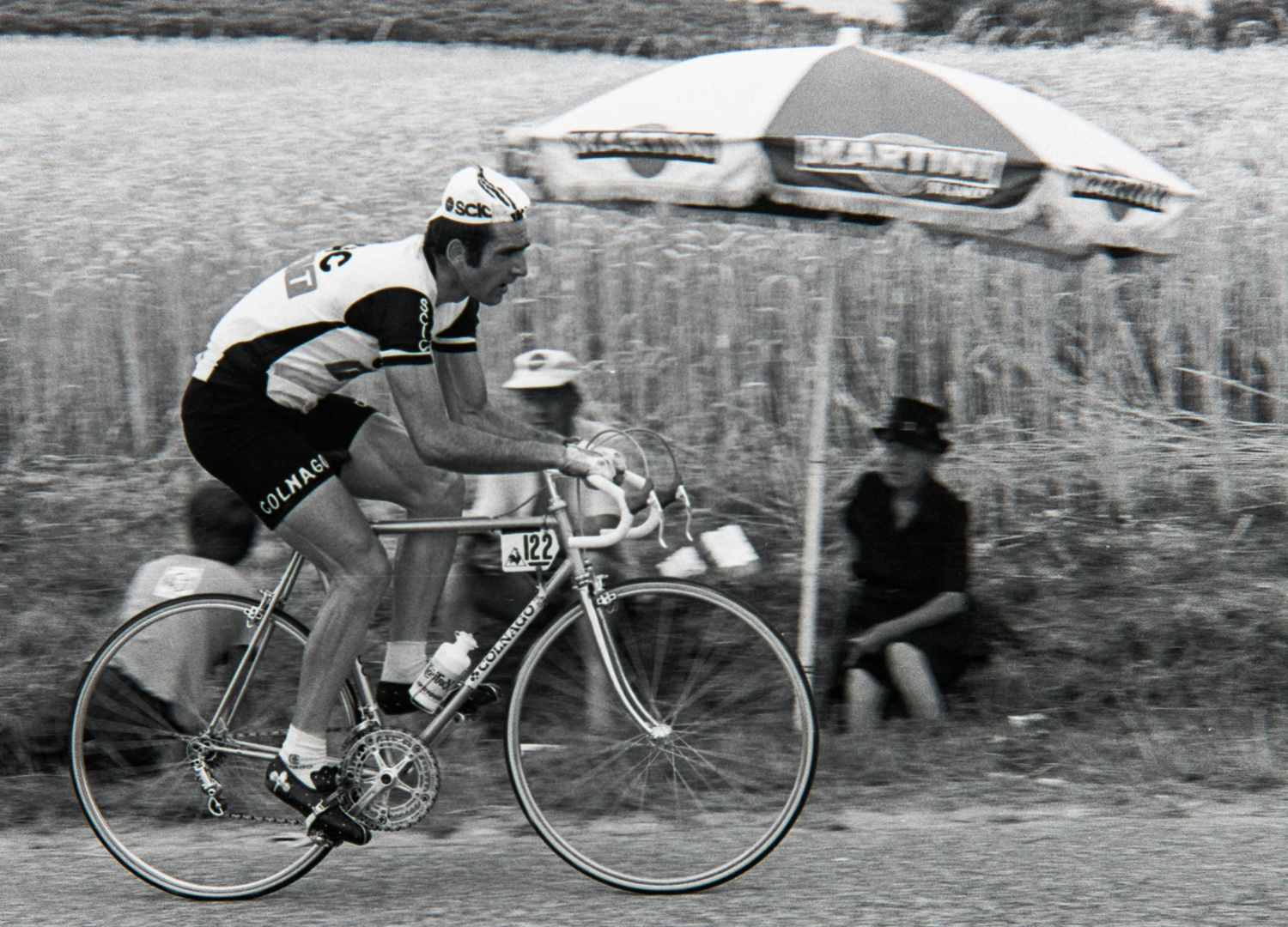 Arnaldo Caverzasi durant le Tour de France 1976. Photographie : René Milanese